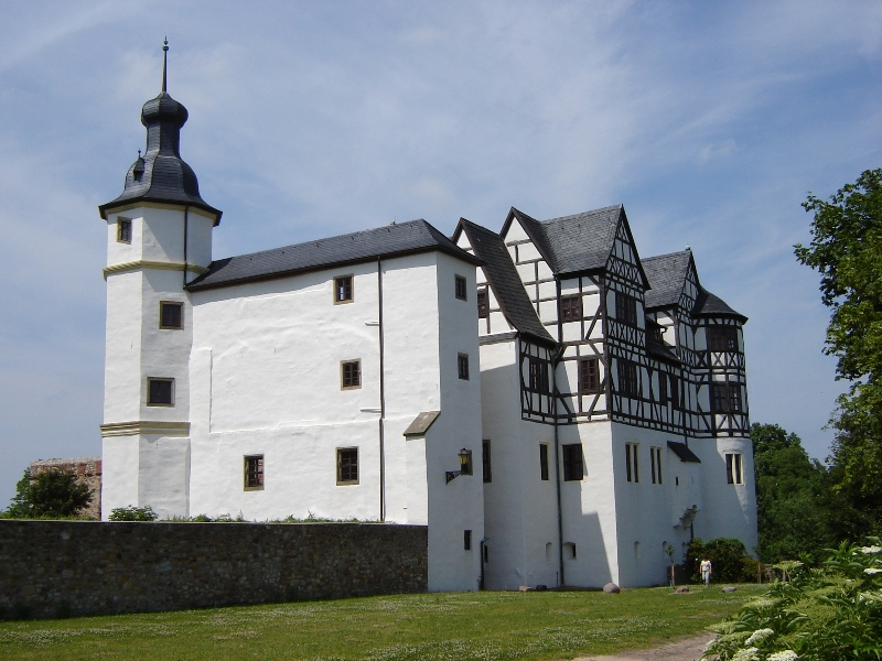 Hobeck-Schloss in Leitzkau (Sachsen-Anhalt)